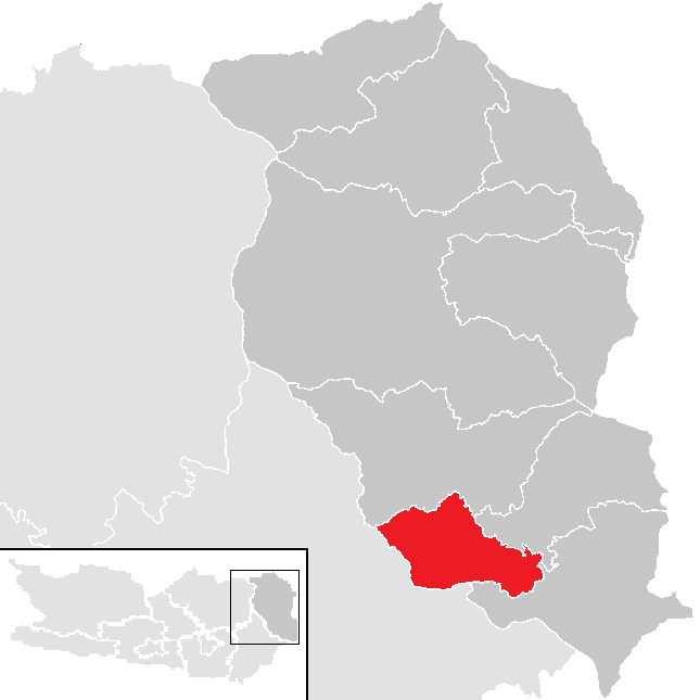 Bezirk Wolfsberg